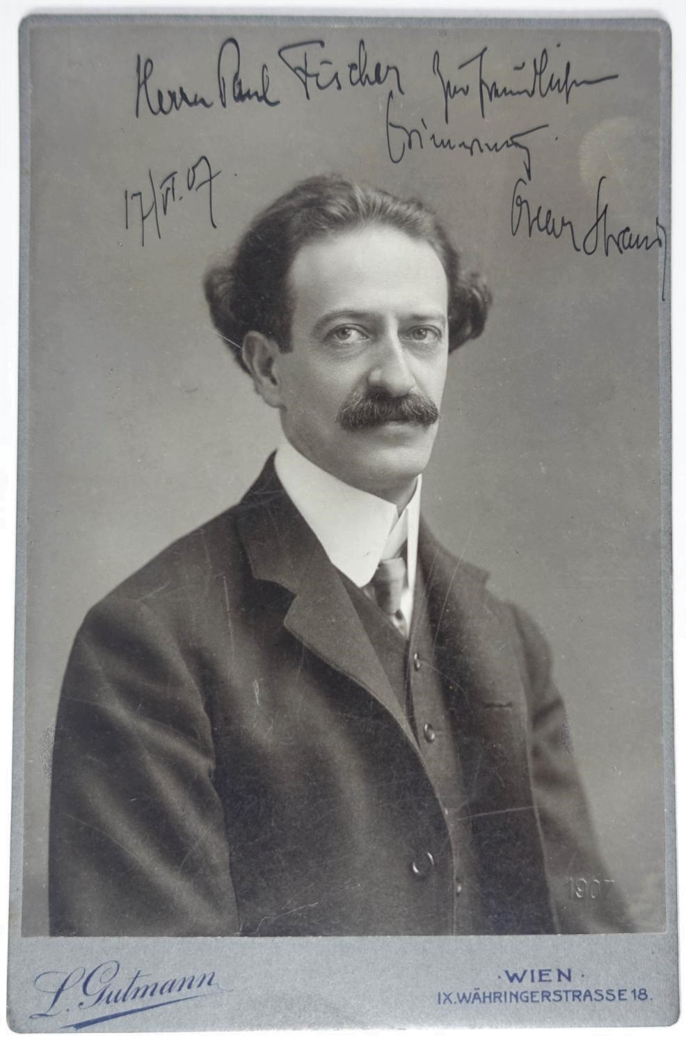 Oscar Straus, fotografiert von Ludwig Gutmann, Wien. Mit einer Widmung von Oscar Straus für Paul Fischer (Violinist, Mitglied der Wiener Philharmoniker und 2. Geiger im Rosé-Quartett; 1876-1942)